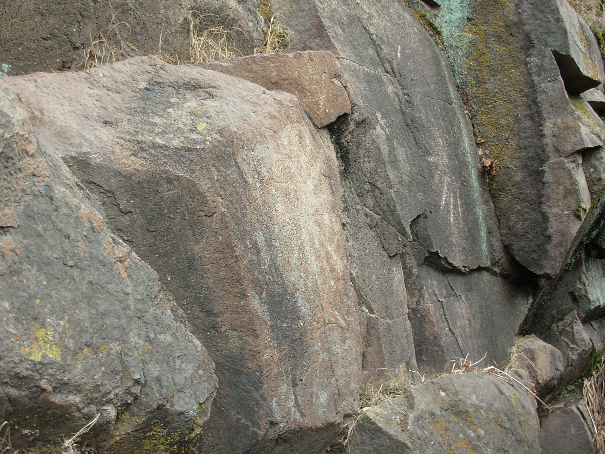 Imagen de sol pintado en cerro de Malloa